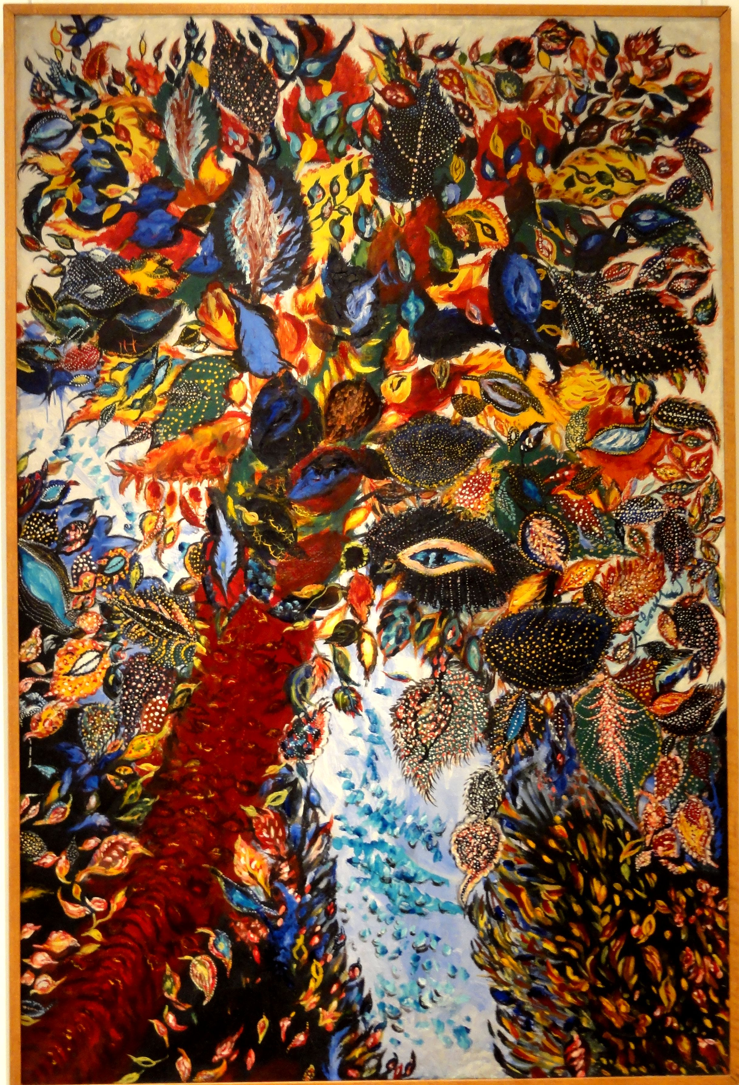 Séraphine Louis, L'arbre de Pararadis, Ripolin sur toile, vers 1928-30.